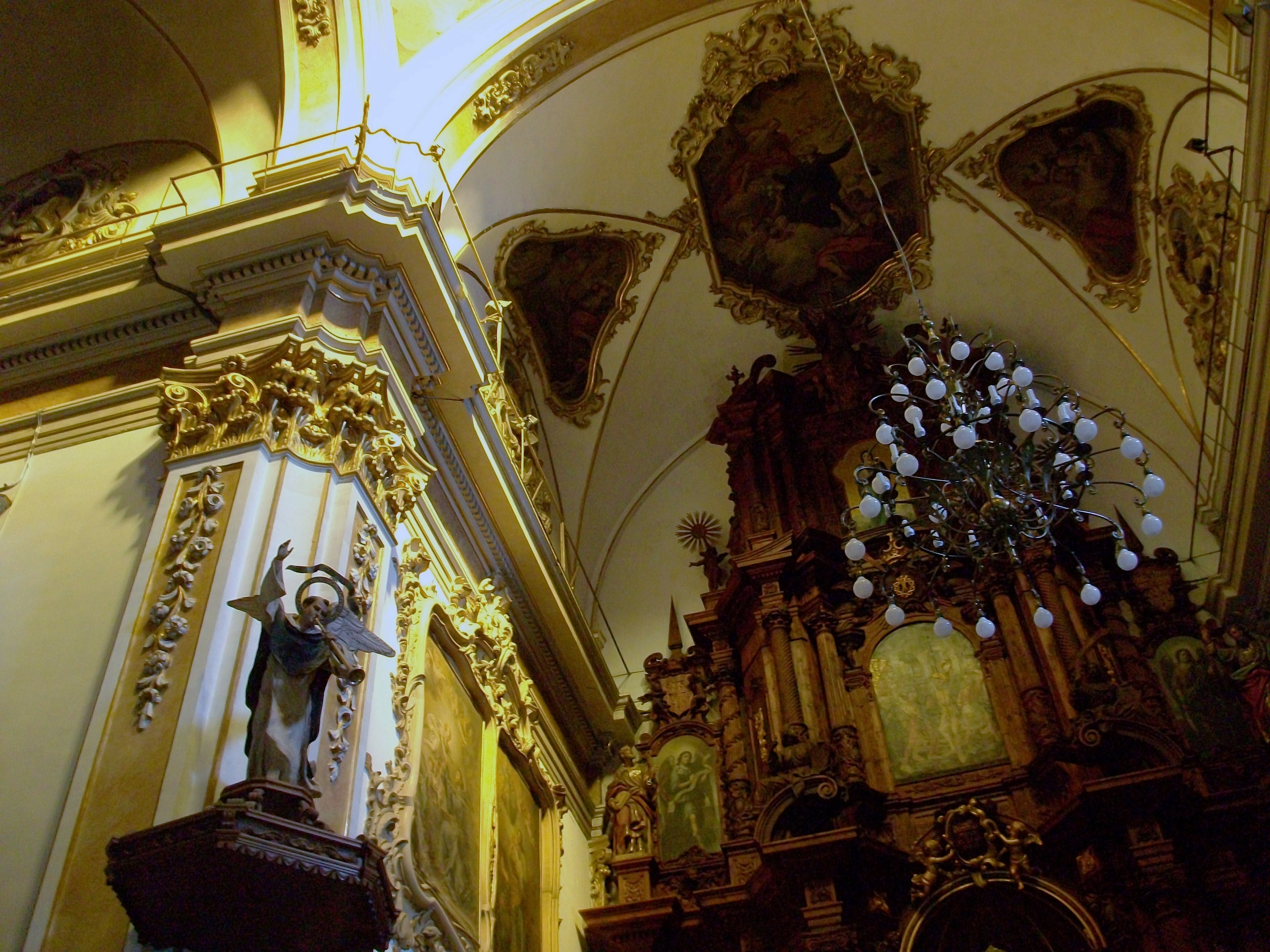 Interior de l'església de Sant Tomàs i Sant Felip Neri de València.